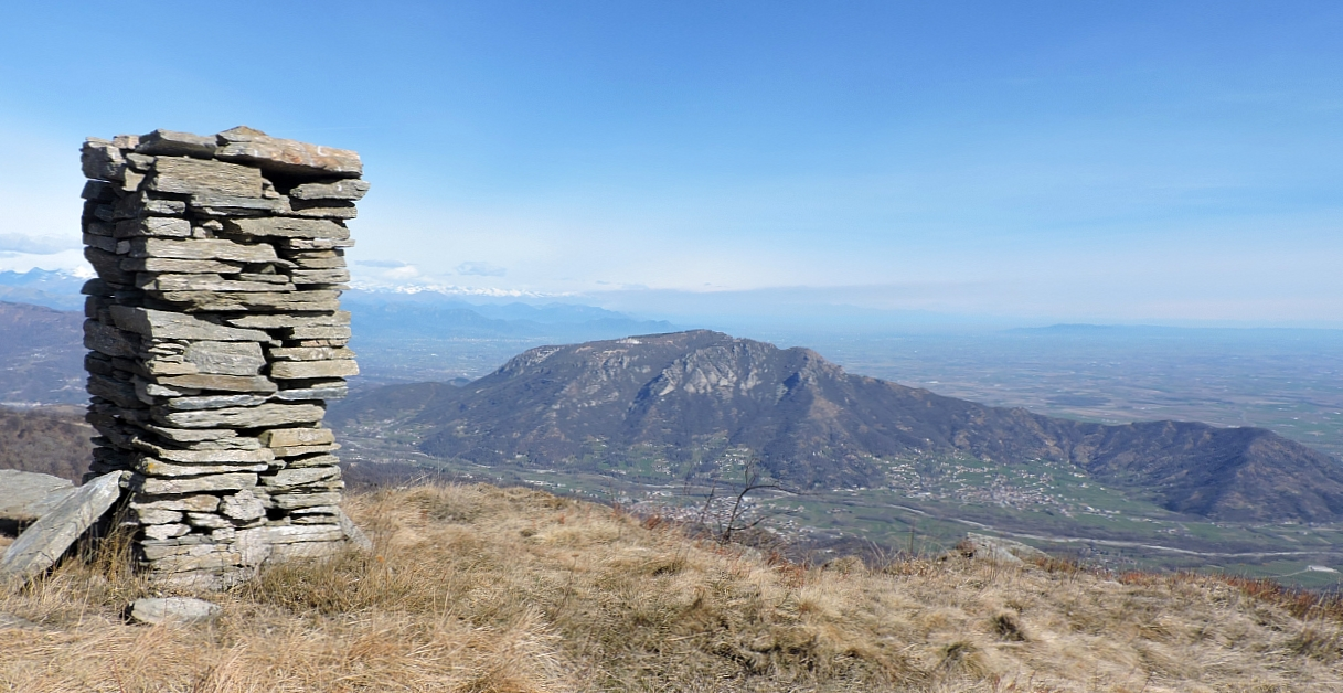 Il monte Scolagarda (Alpi Cozie): ometto a quota 1558 e sullo sfondo il monte Bracco